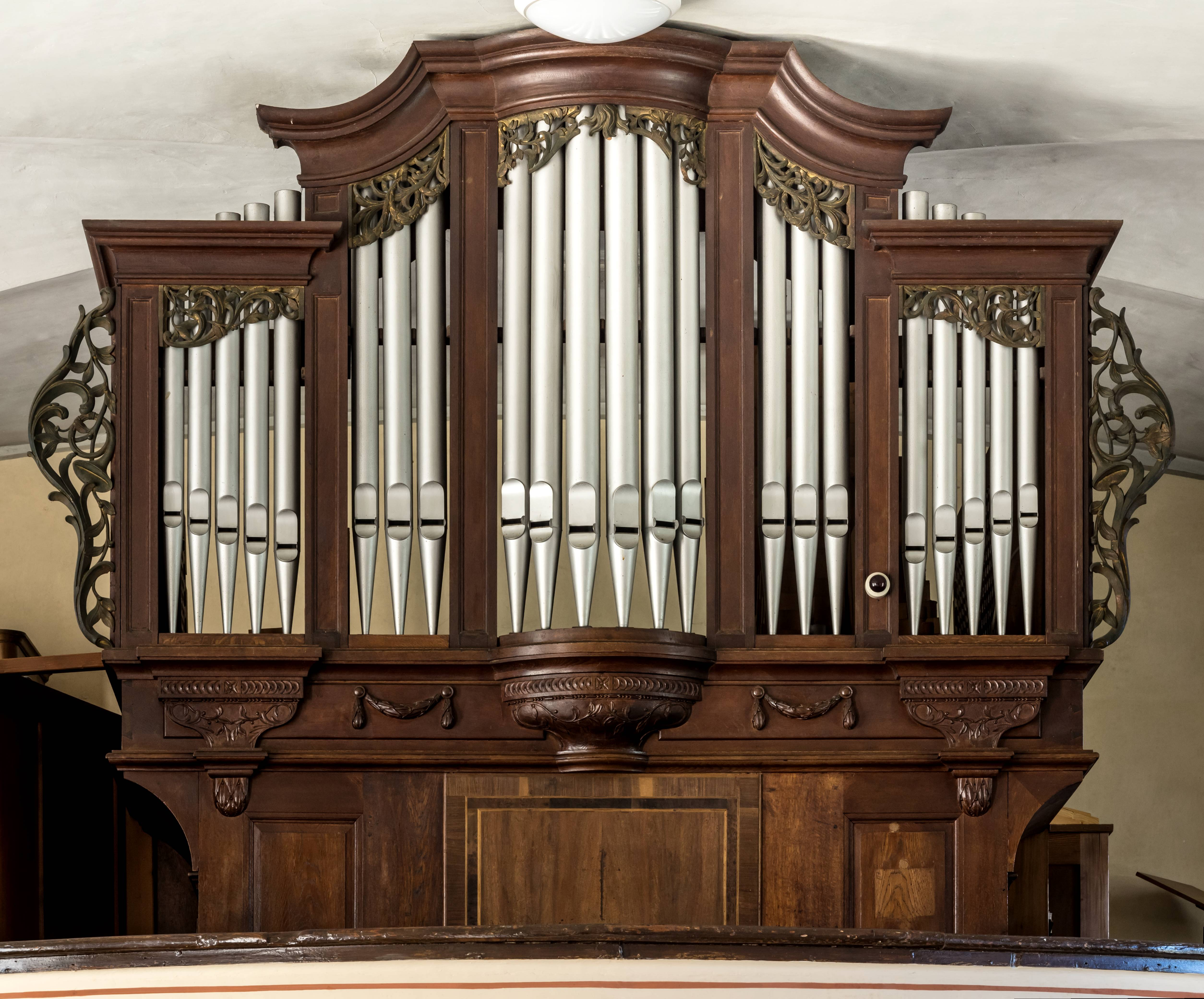 St Vitus in Wettelbrunn einem Teilort von Staufen Die Orgel